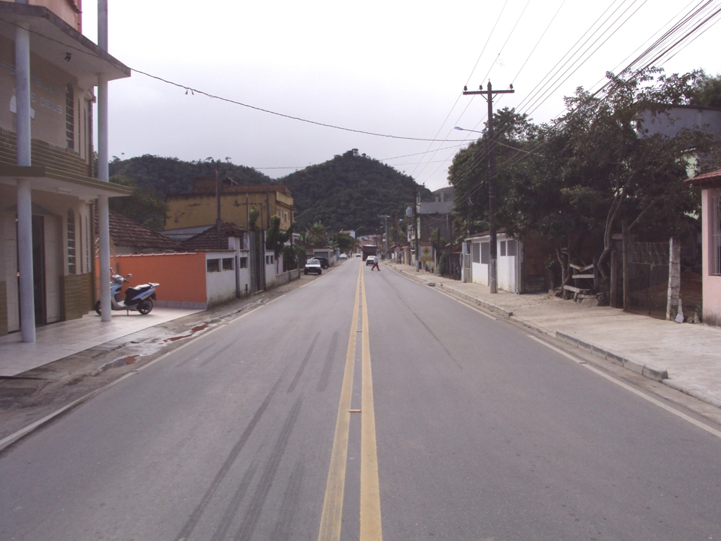 A Rodovia RJ-155, que liga os múnicípios de Barra Mansa e Angra dos Reis.